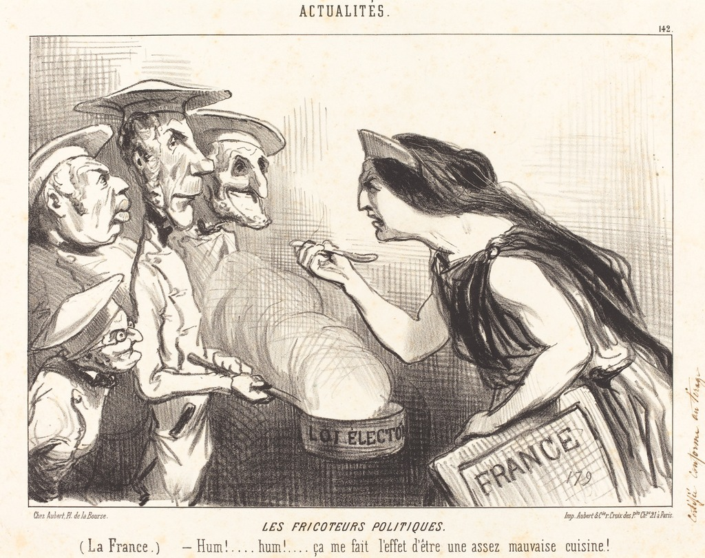 Caricature montrant Thiers, Berryer, Faucher et Molé à gauche, ayant le costume de chefs de cuisine, qui font goûter à une femme représentant la France, à droite, le contenu d'une casserole sur laquelle est inscrit « loi électorale ». Lithographie d'Honoré Daumier, planche n° 142 de la série des « Actualités », Le Charivari, 13 juin 1850.